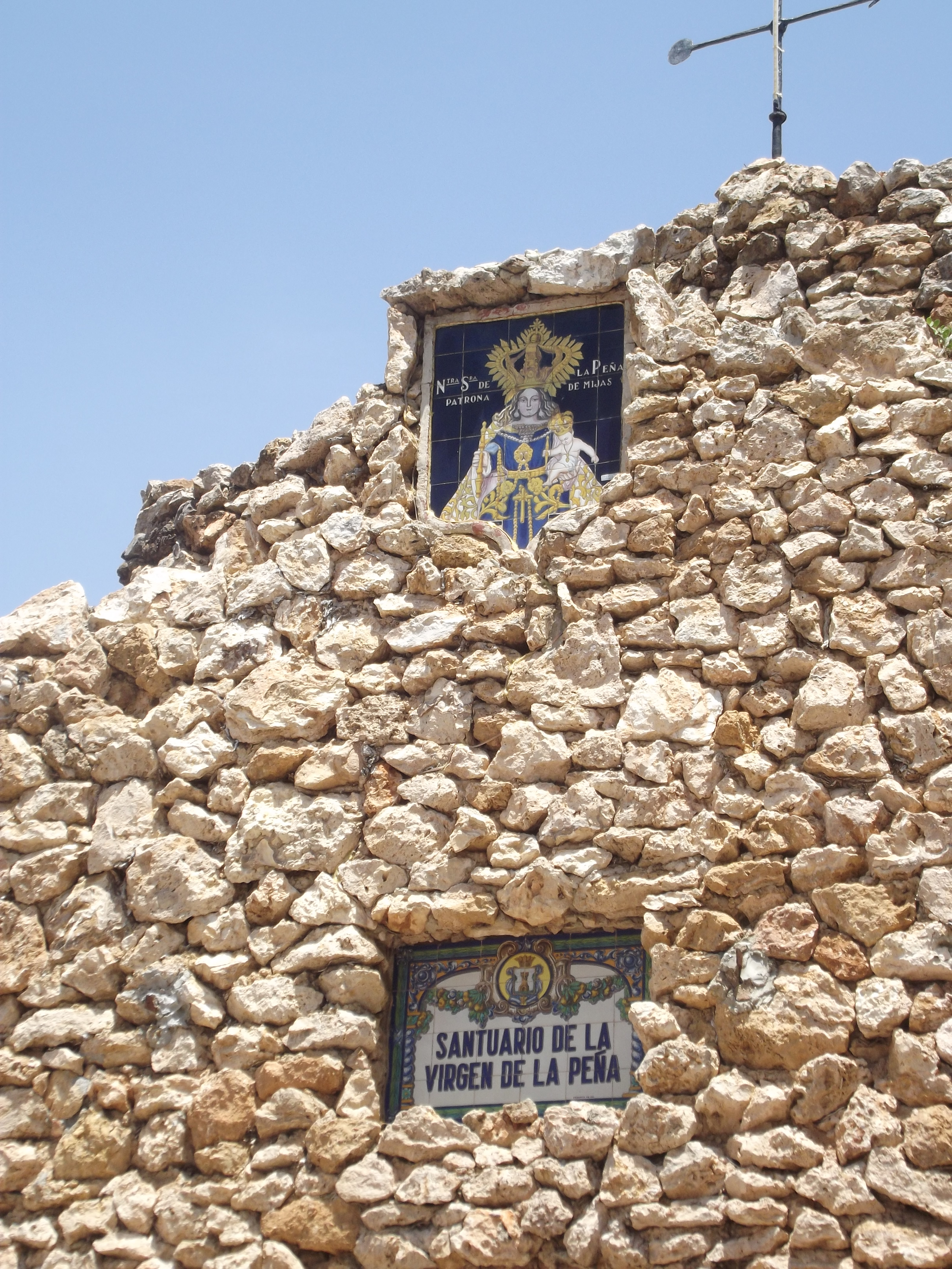 Mijas Pueblo